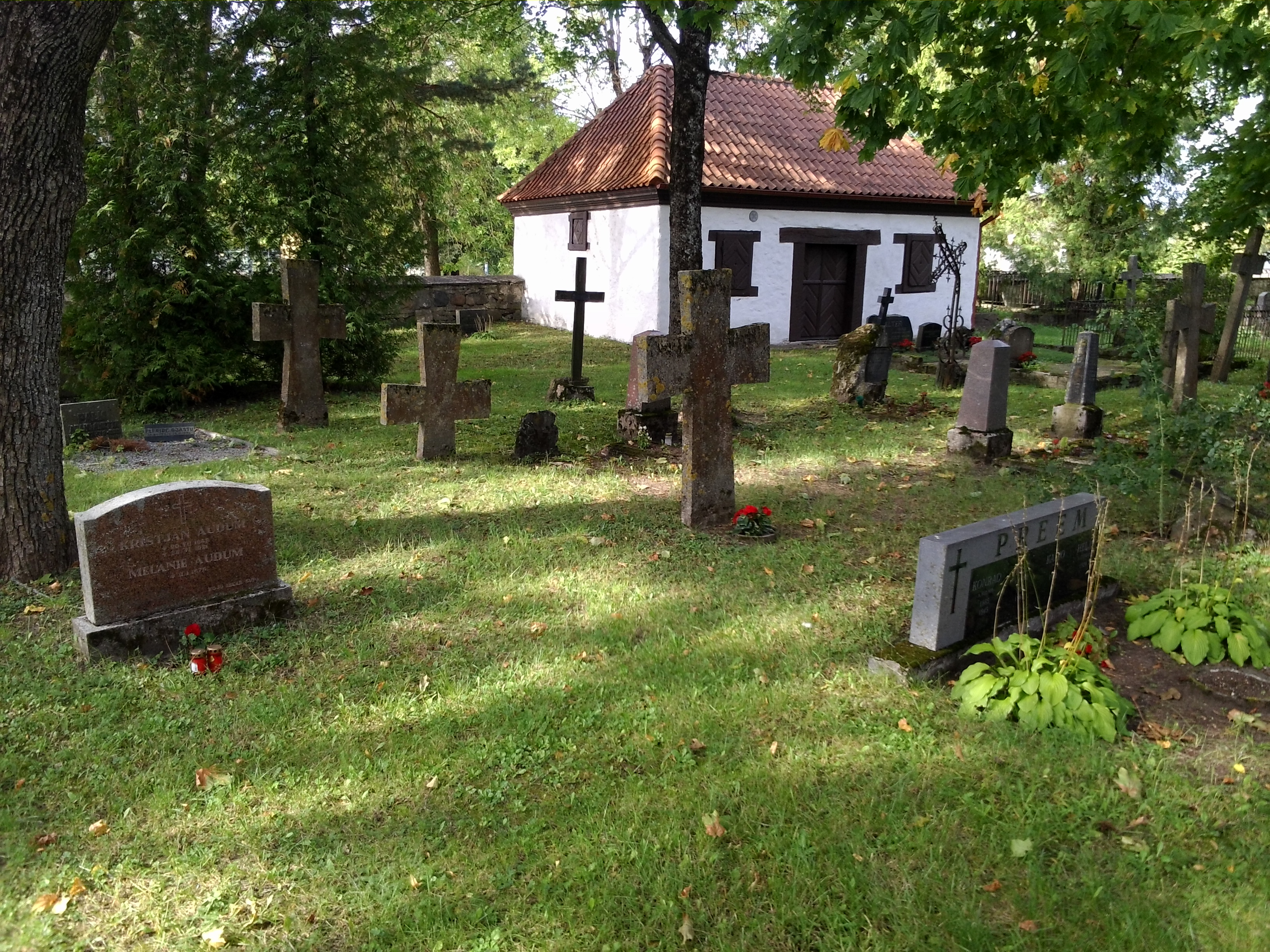 Keila kirikuaia kabel 3, 19.saj.